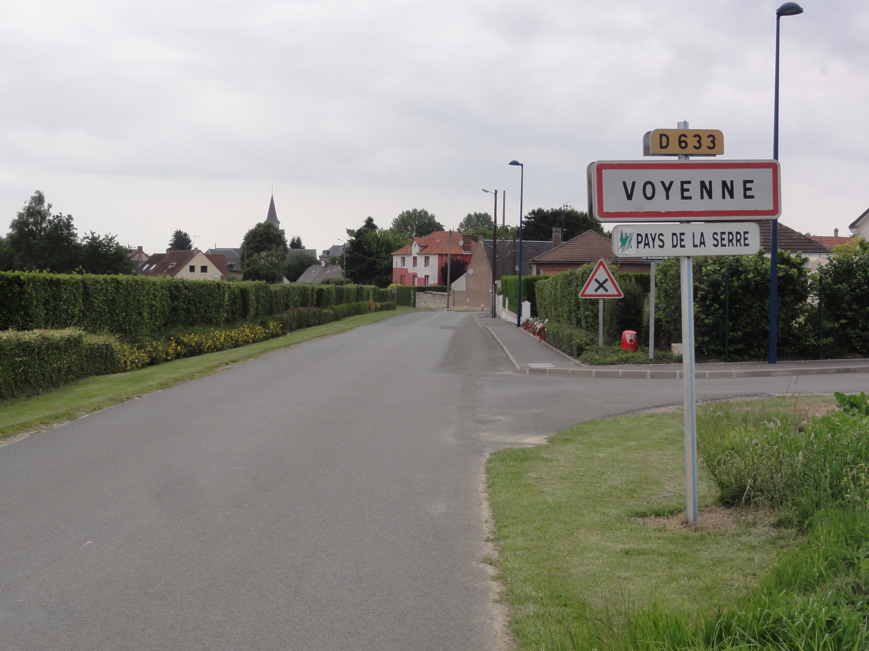 Voyenne (Aisne) city limit sign